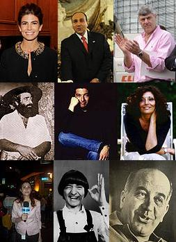 Algunos de los argentinos de ascendencia libanesa más destacados. De izquierda a derecha y de arriba a abajo: Juliana Awada · Juan Luis Manzur · Ricardo Buryaile · Jorge Cafrune · Ricardo Darín · Alicia Kozameh · Nínawa Daher · Carlitos Balá · Felipe Sapag